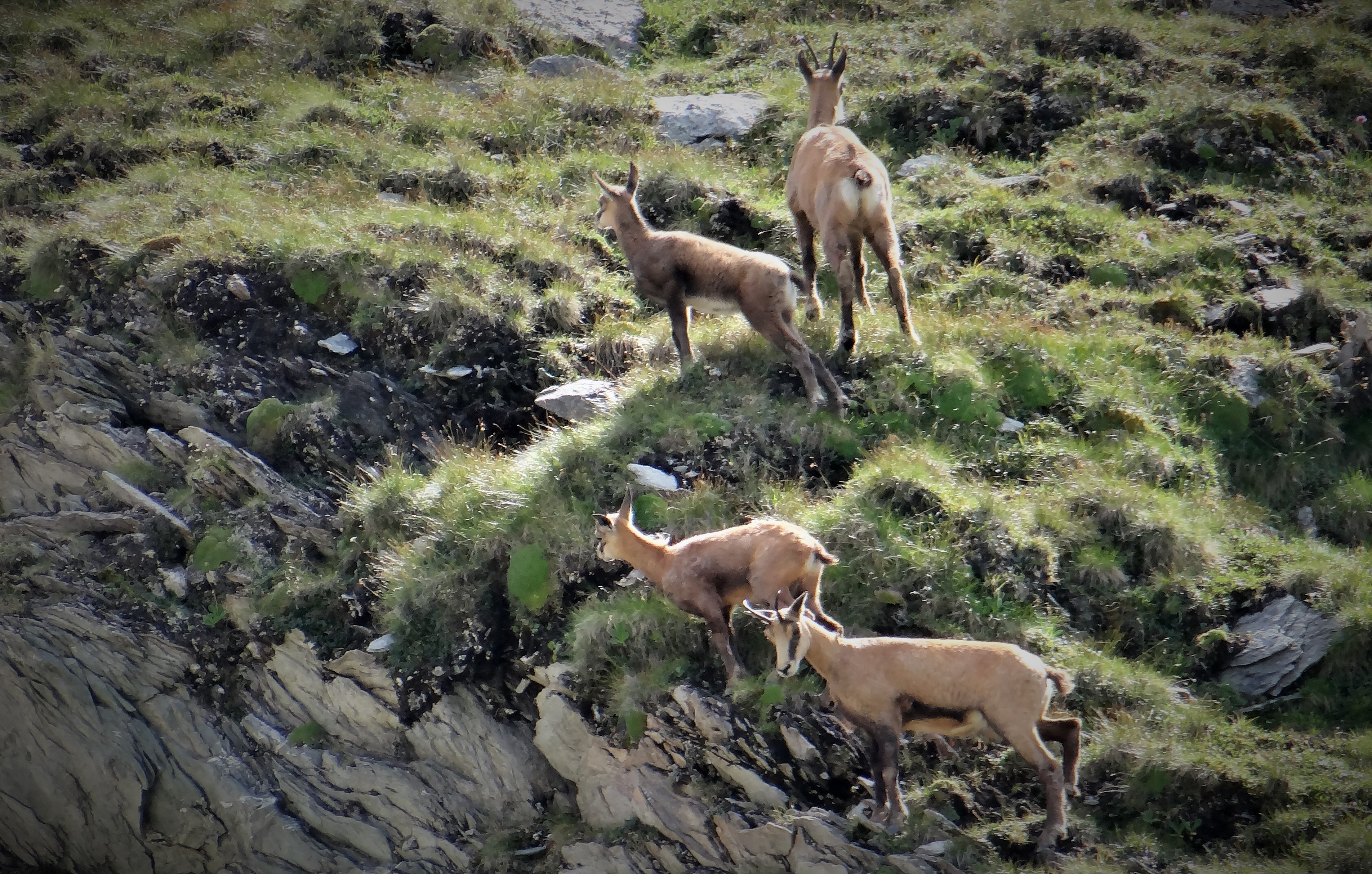 Chamois au cirque du Rosoire (2397m)